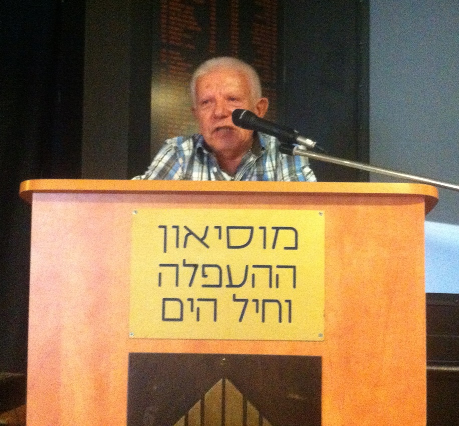 רב חובל מריאנסקי מדריך מבקרים במוזיאון ההעפלה וחיל הים